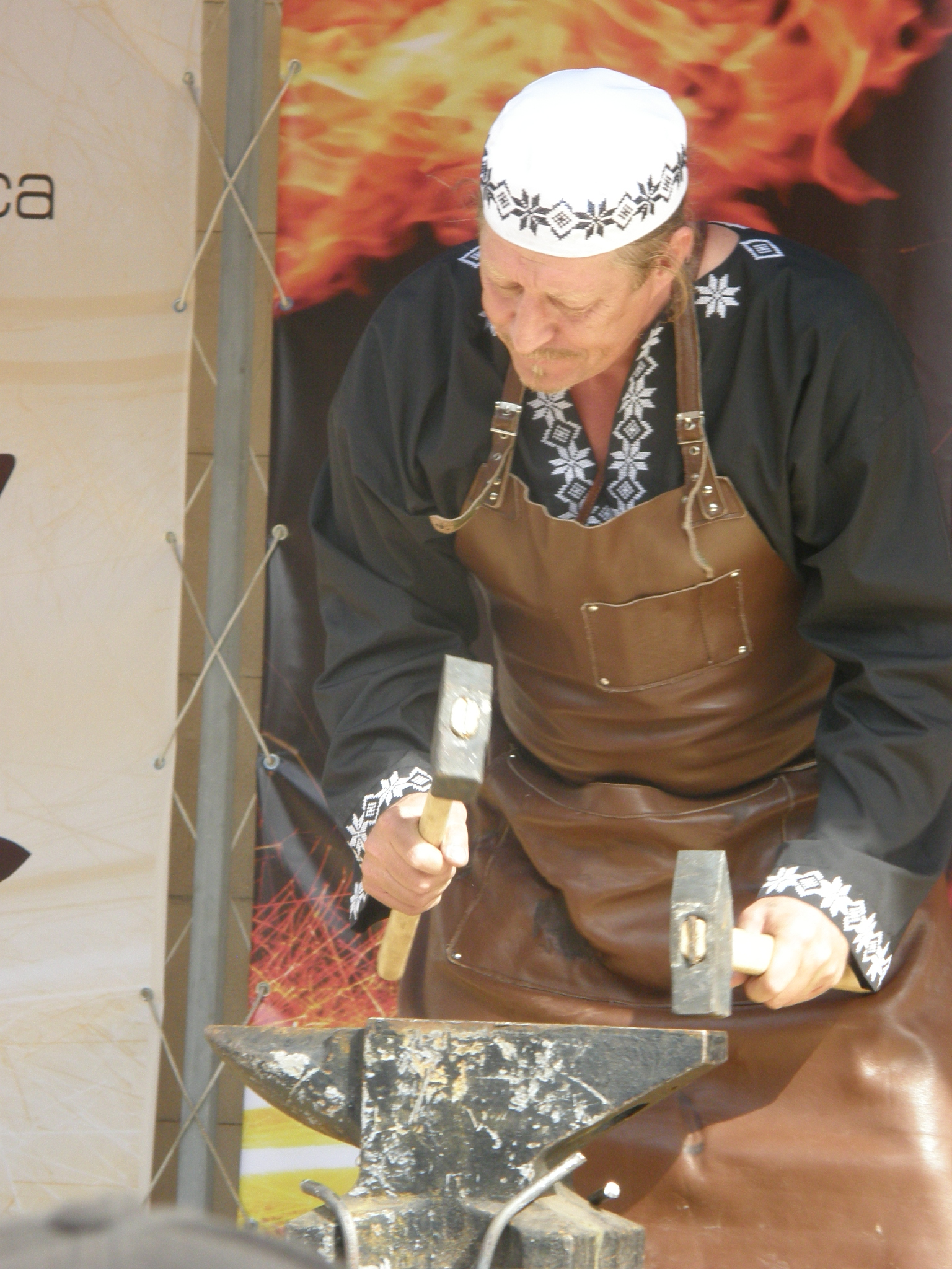 Конкурс кузнечных костюмов на 12 международном кузнечном фестивале в Донецке